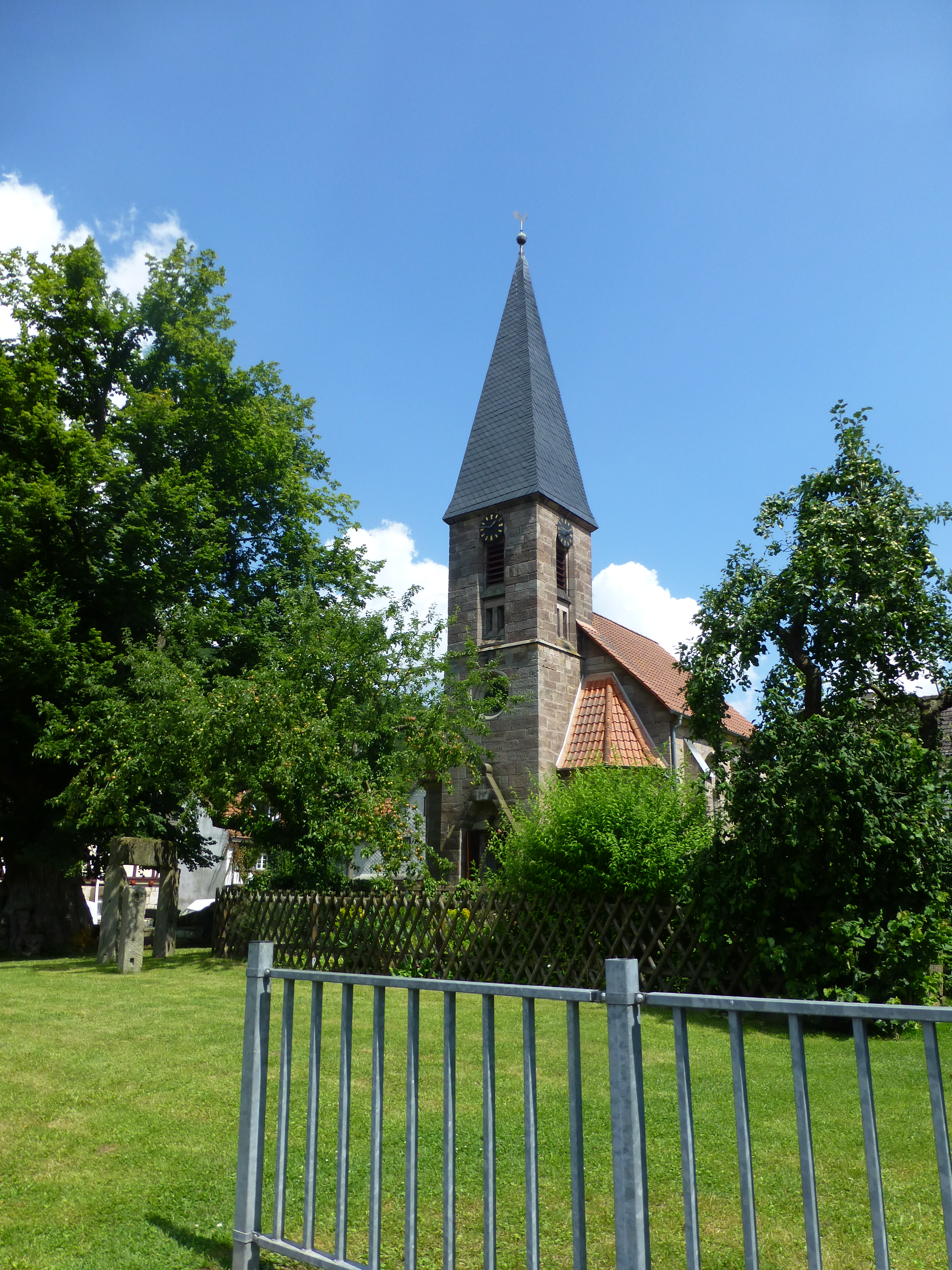 Die Kirche in Vatterode